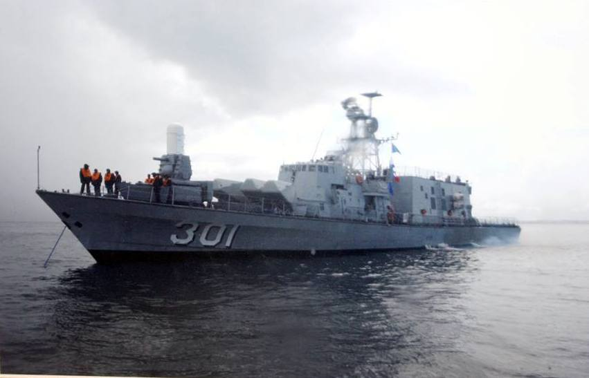 אח"י עליה בשירות חיל הים המקסיקני